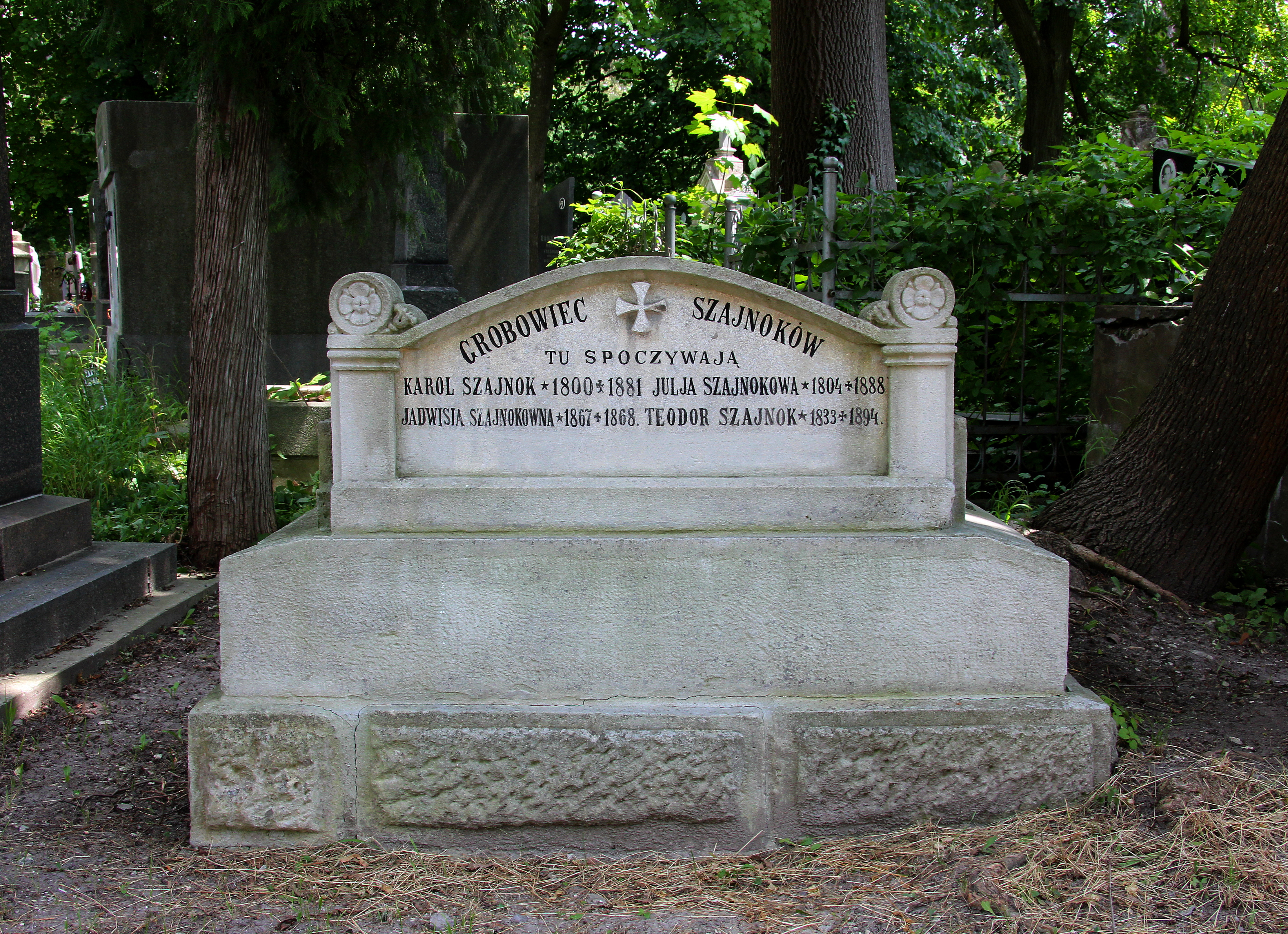 Гробівець Шайноків на Личаківському цвинтарі